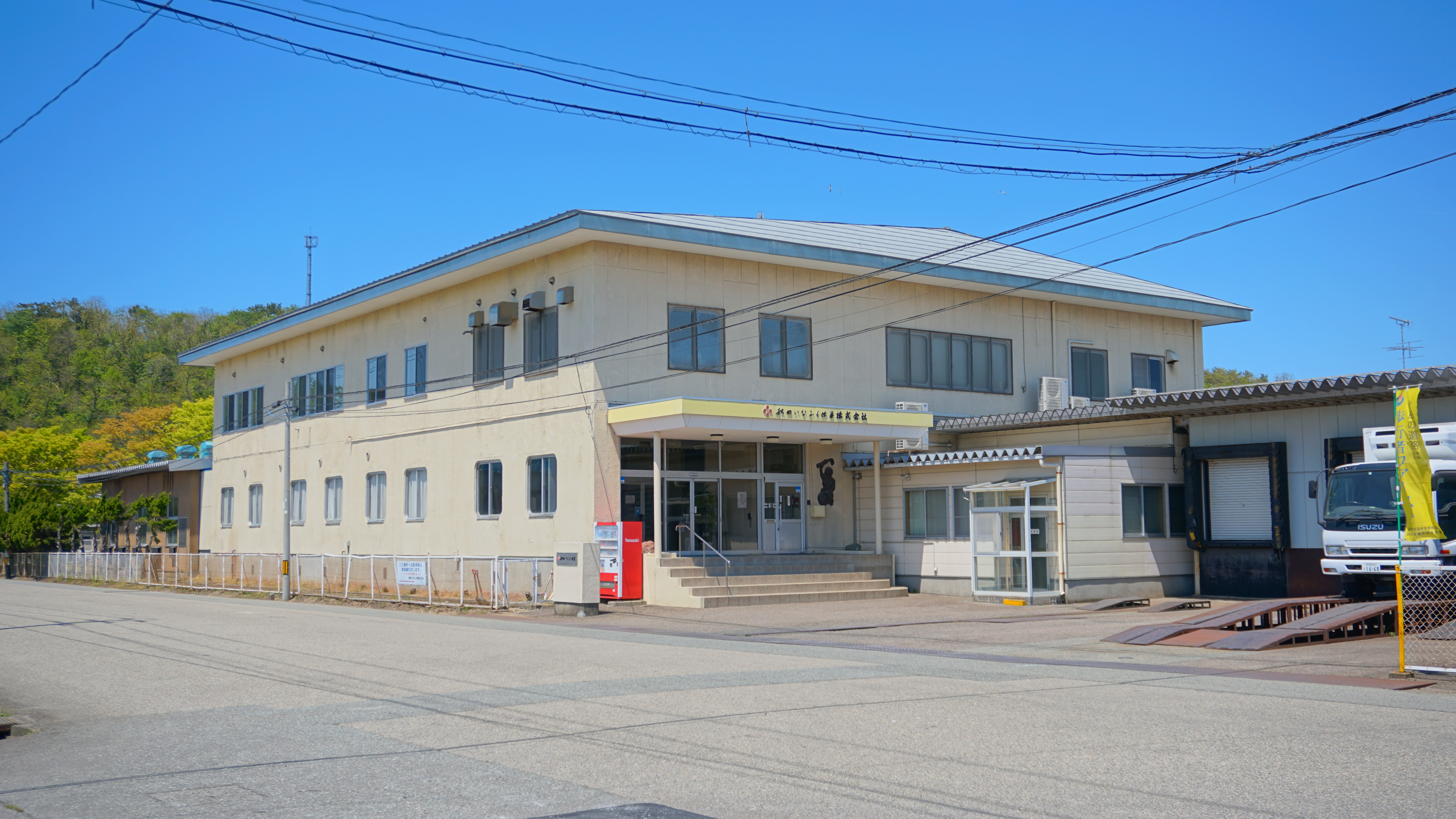 秋田いなふく米菓